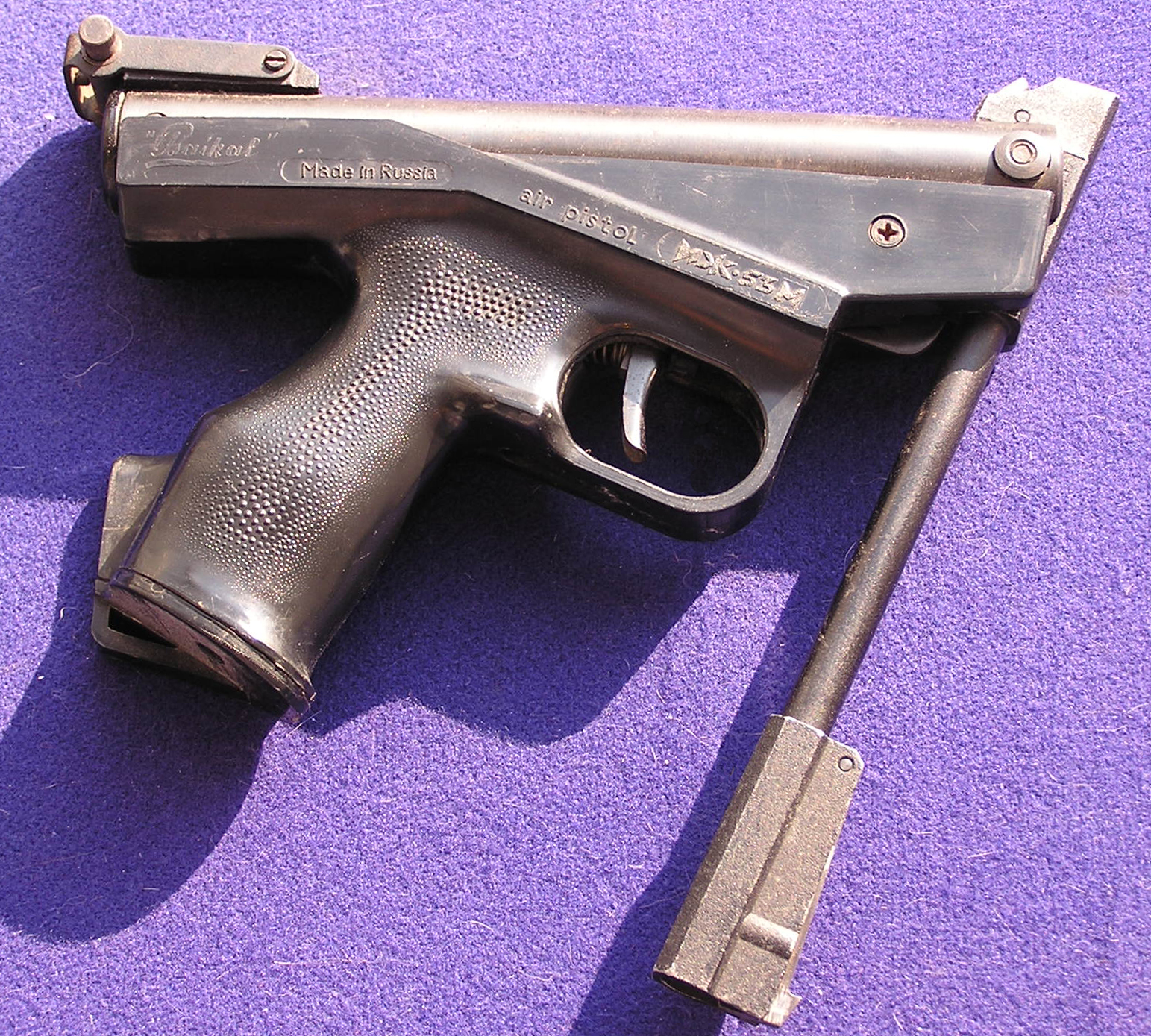 Пневматический пистолет ИЖ-55М